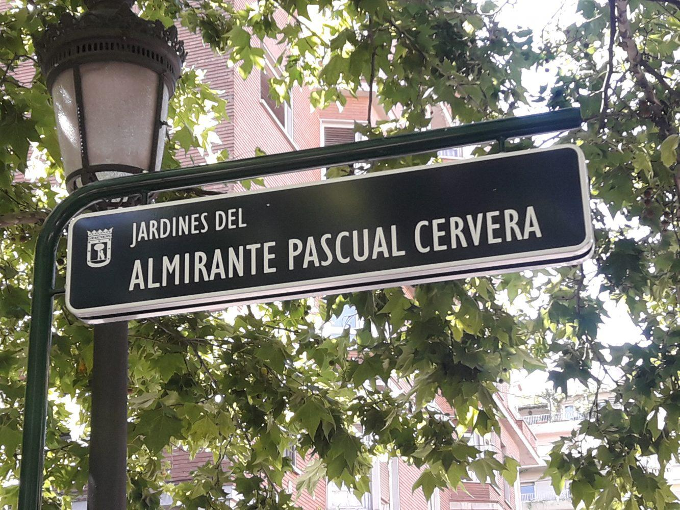 La zona ajardinada de la plaza del Conde de Valle de Suchil, en Chamberí, llevará el nombre de “Jardines del almirante Pascual Cervera”. Esta mañana se ha descubierto una placa que recordará el nombre del ilustre marino español en el distrito madrileño.